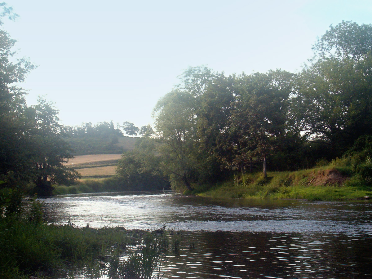 L'Arroux